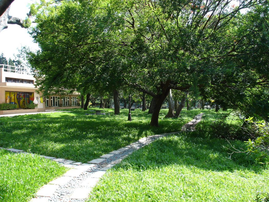 國立清華大學成功湖畔的樹木，攝於2005年6月6日。